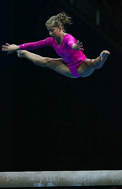 Gymnast jumping on beam